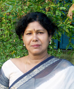 सरोजिनी साहू